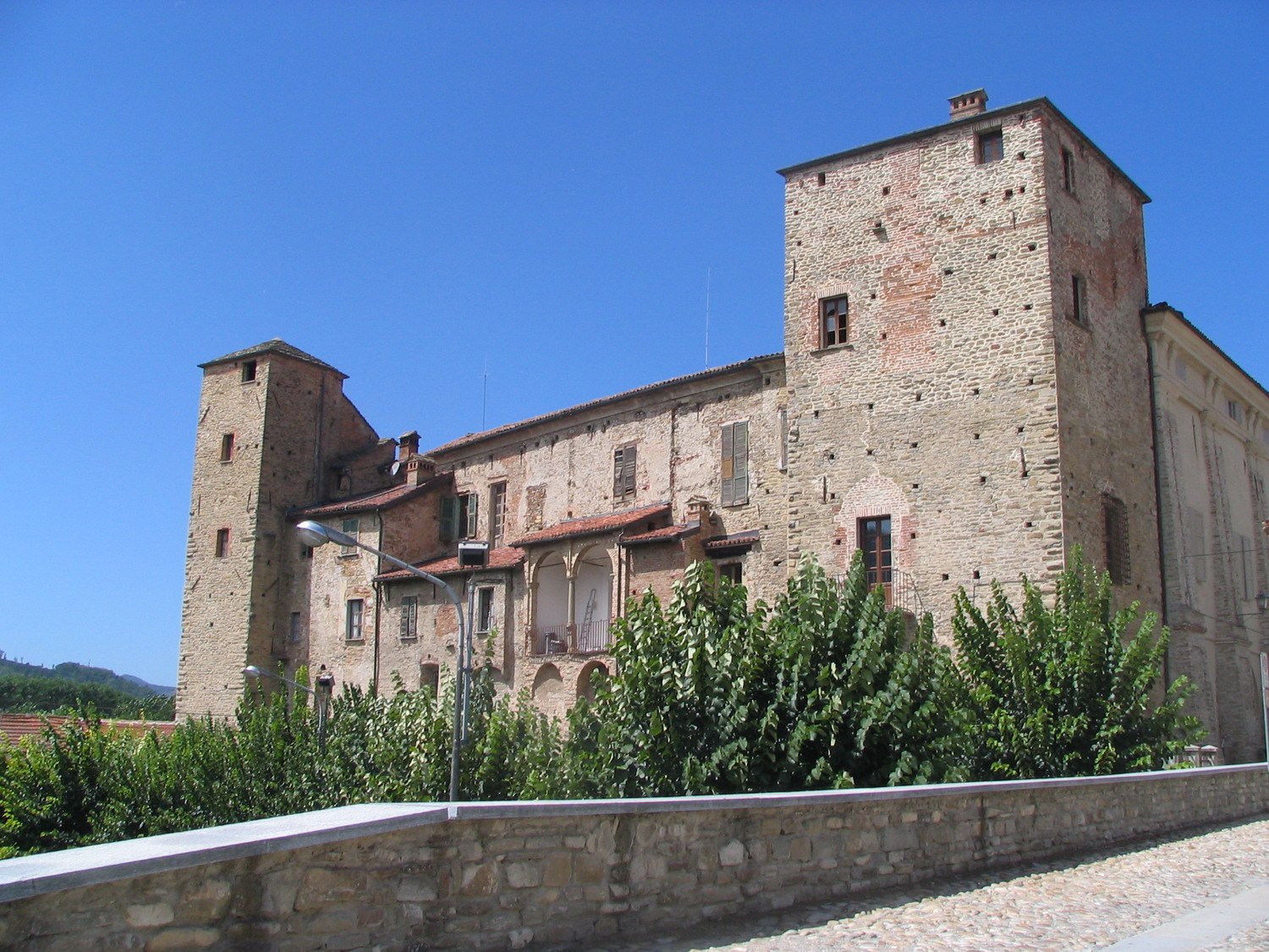 Monastero Bormida Foto fatta da me Faberh 2006.